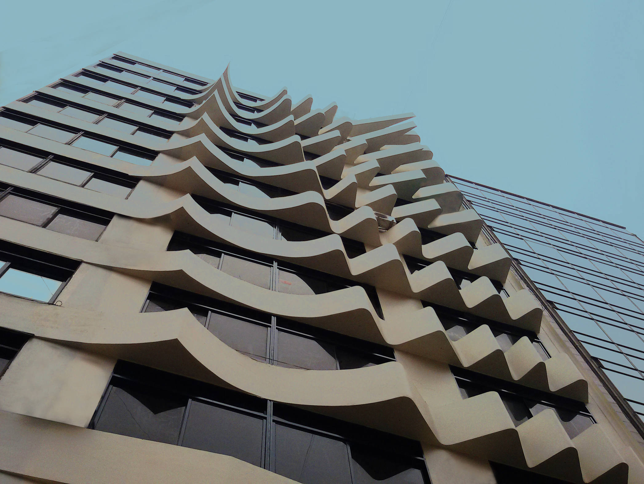 Fachada diseñada por Luis Wells, 1980, Edificio de Oficinas, Av. Corrientes y Libertad, Buenos Aires